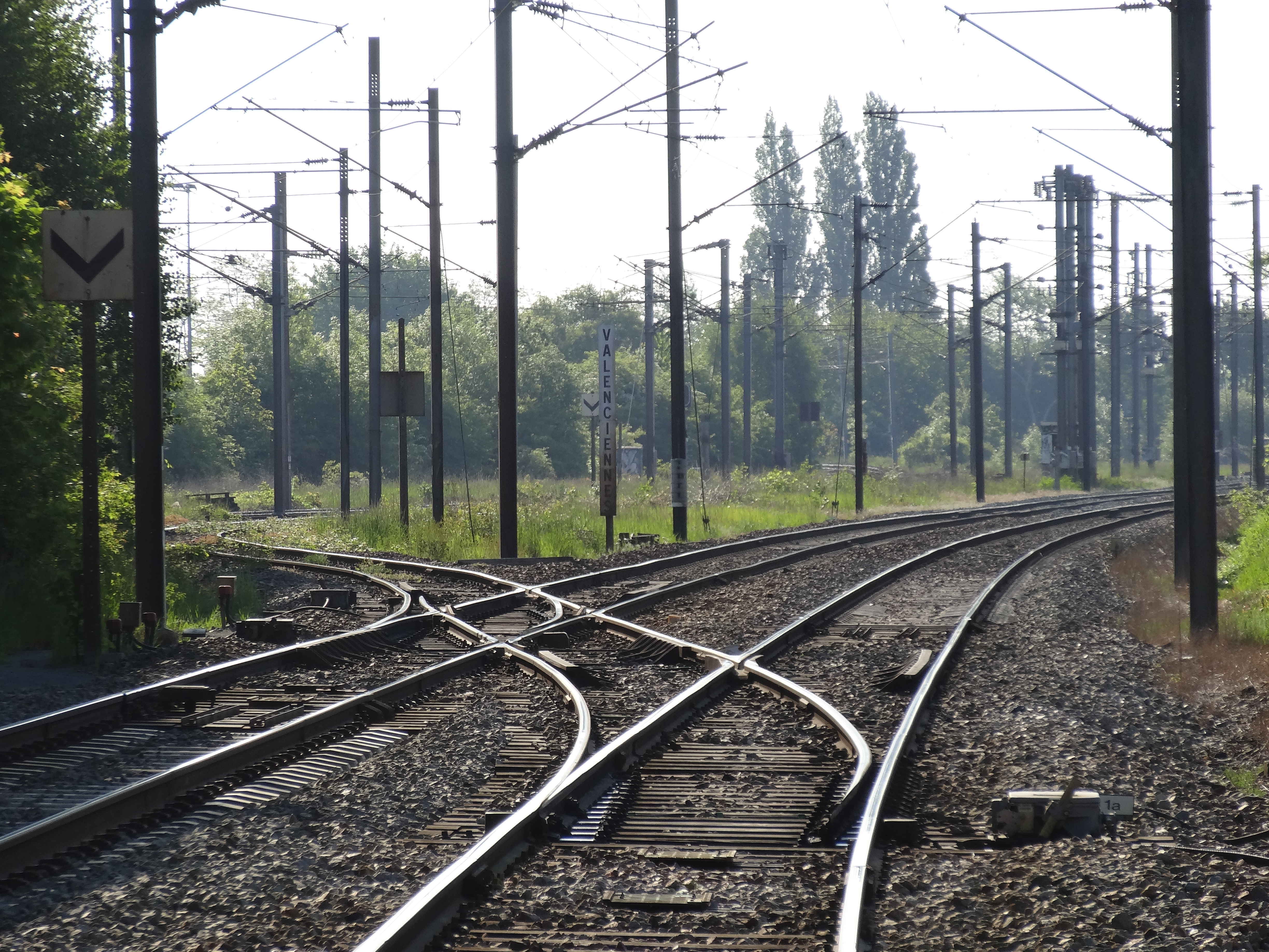 Gare de Beuvrages, Nord, Nord-Pas-de-Calais, France.